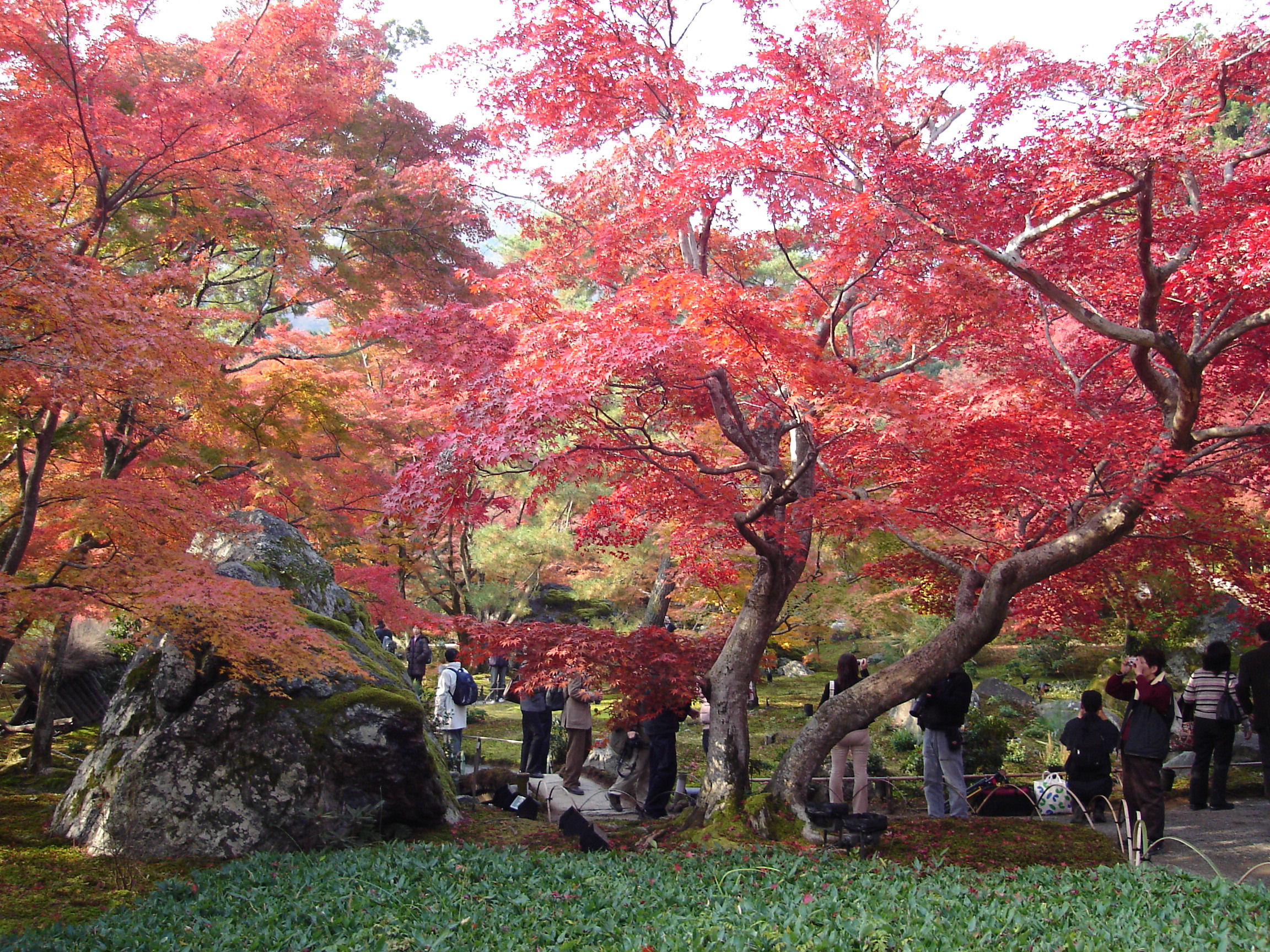 Tenryuji Hogonin Shishiiwa, kyoto japan